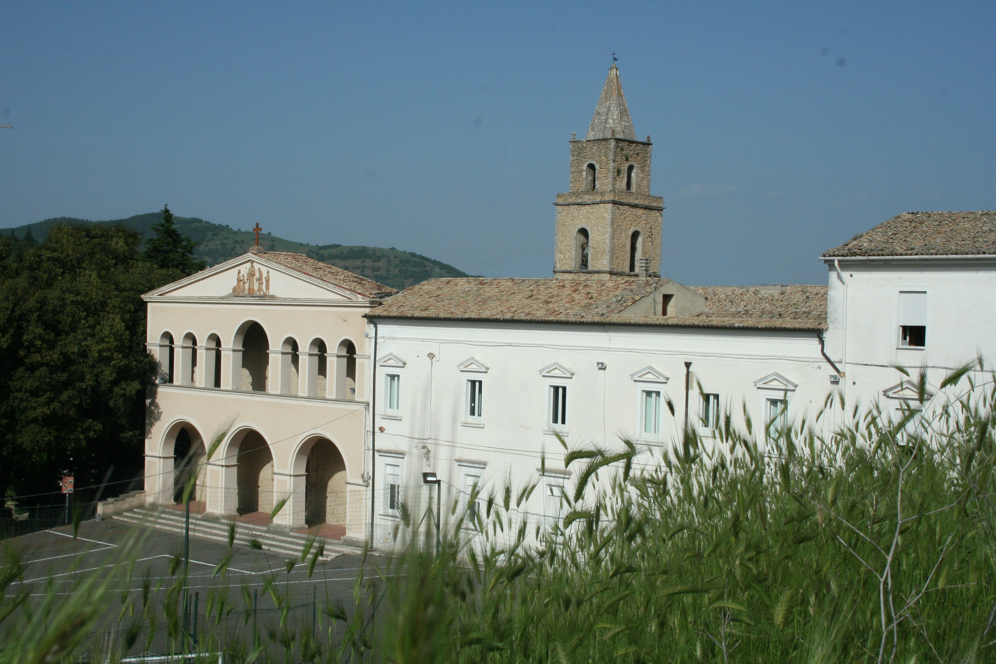 Complesso di Sant'Antonio di Padova, fondato nel 1491, fu convento dei frati Minori dell'Osservanza, oggi è la Casa Madre delle suore Discepole di Gesù Eucaristico.